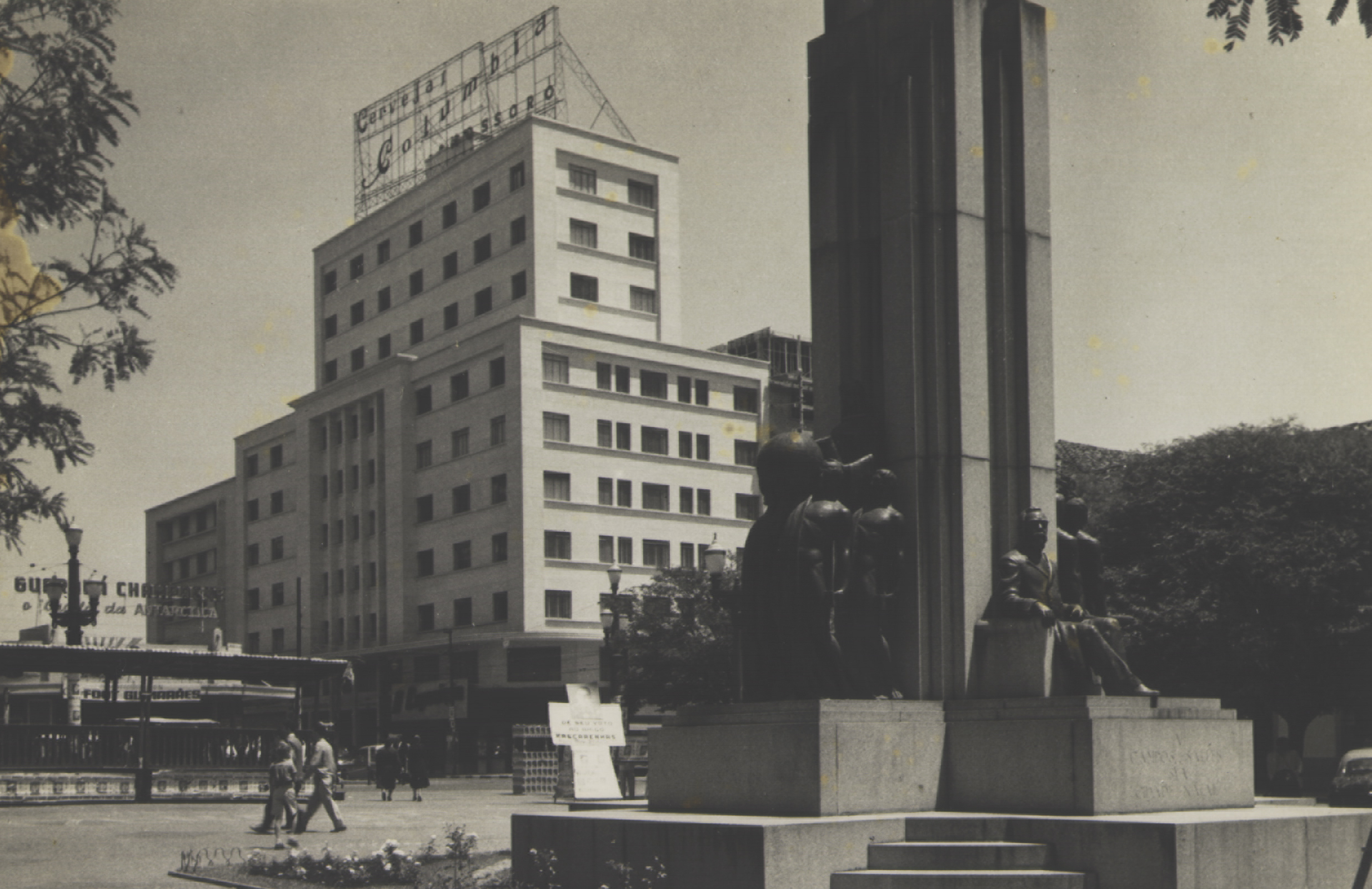 Obra que integra o acervo do Museu Paulista da USP. Coleção Werner Haberkorn